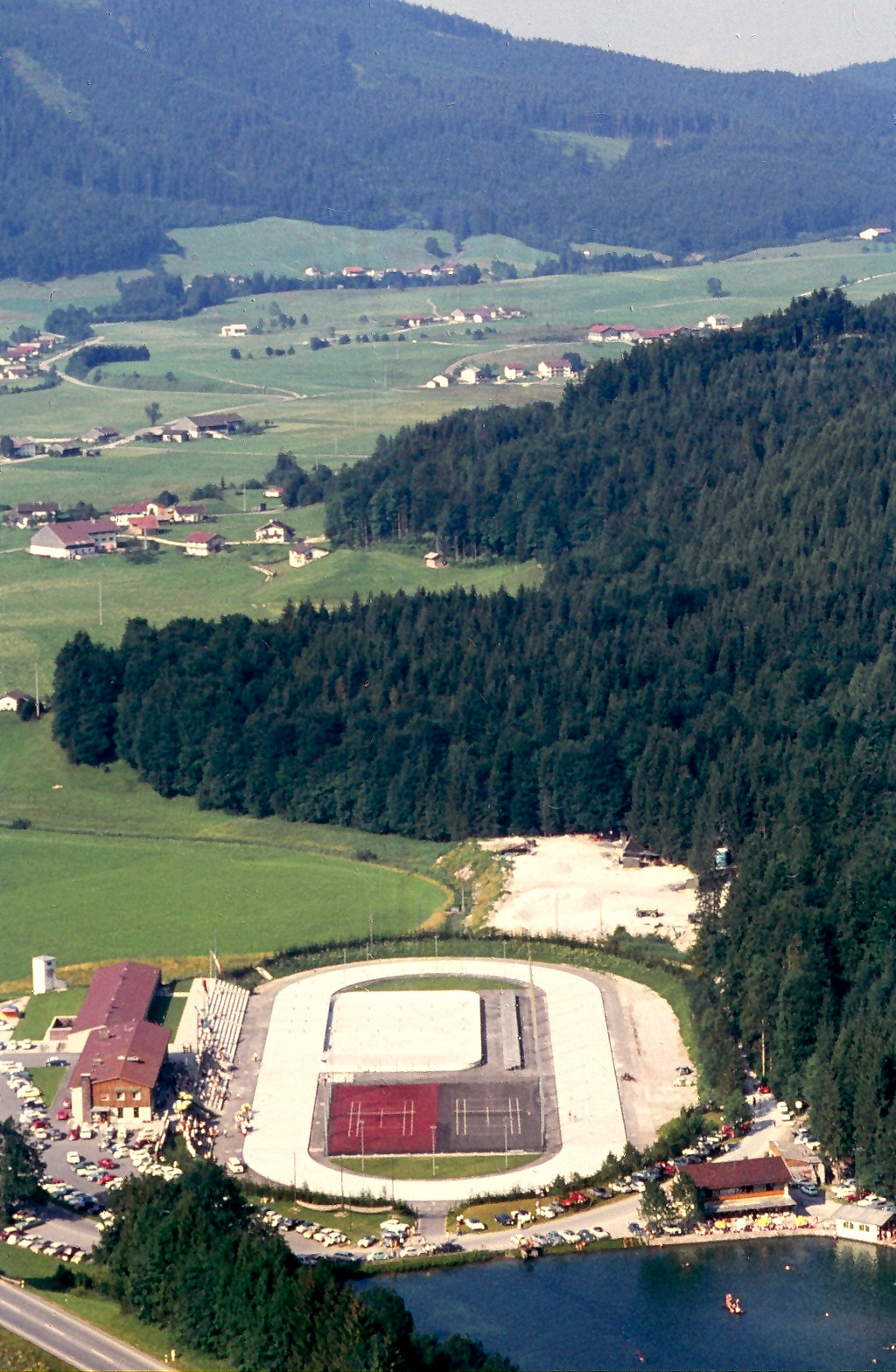 Inzell, Germany: Natureisbahn (an der Stelle des heutigen Eisstadions), ca. 1963-1964.